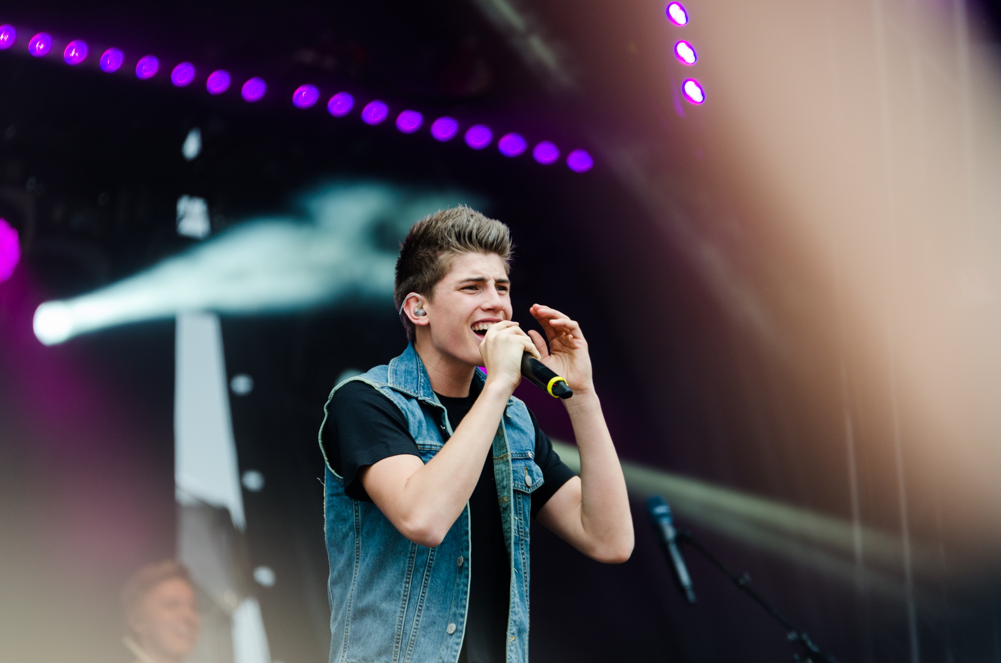 Robin Ylex PoP 2014:ssa Oulussa